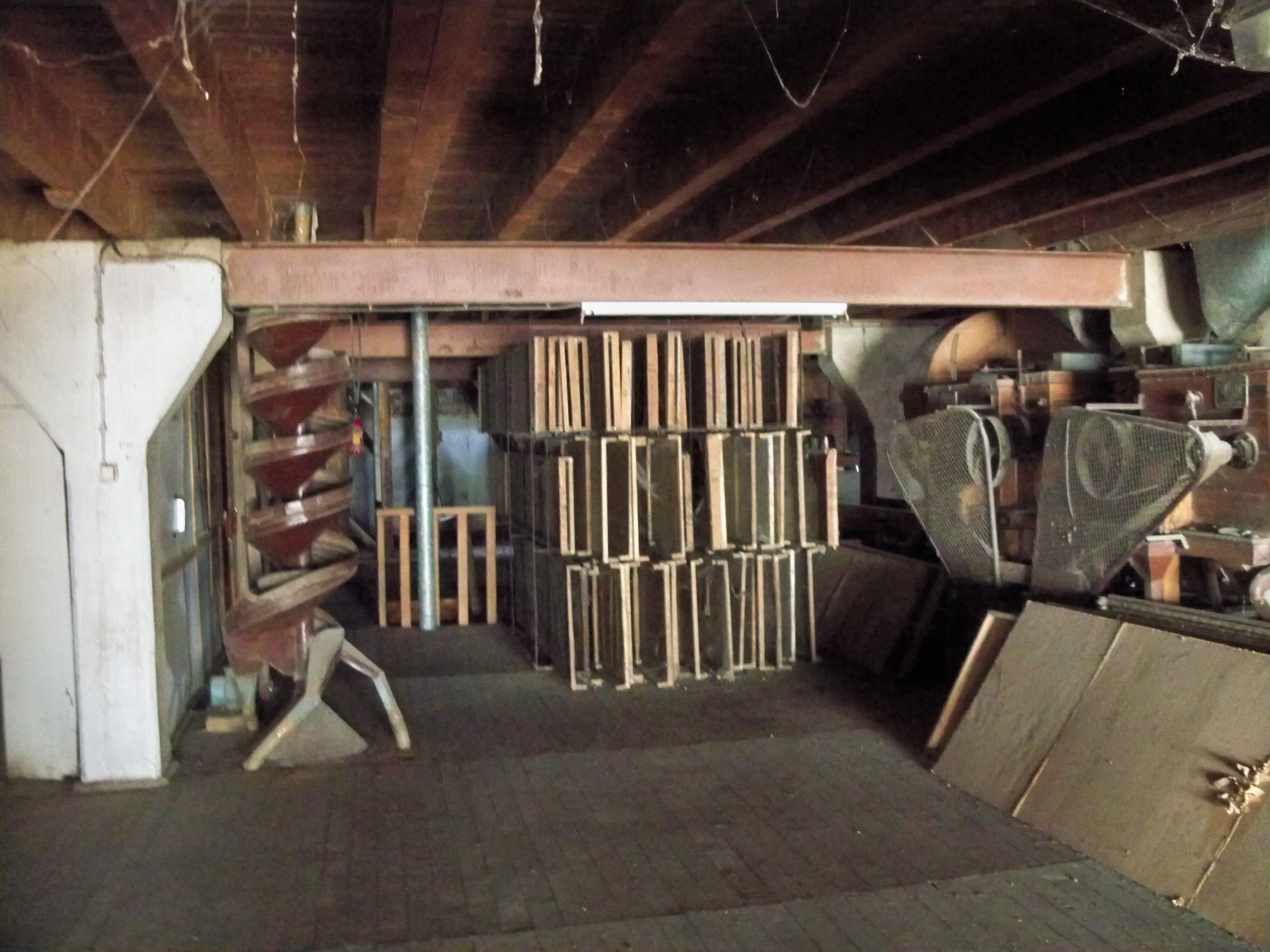 Intérieur de la Graineterie Aimé Roux, Carpentras (84) .